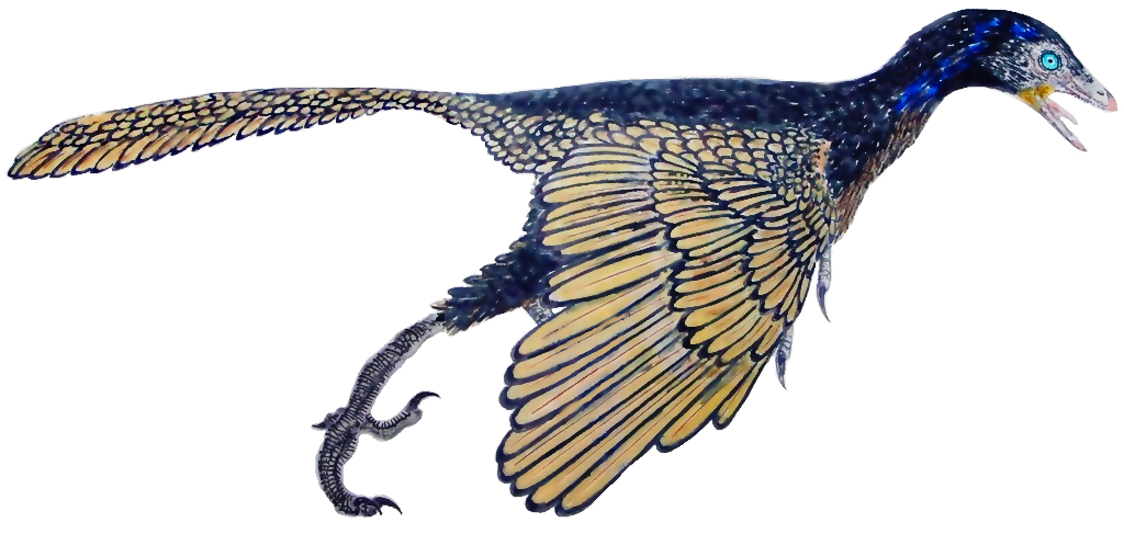 Restauración del aspecto en vida del dinosaurio transicional Archaeopteryx lithographica que habitó en el Jurásico tardío, hace unos 150 millones de años, en lo que hoy es el sur de Alemania. Está realizado a partir del esqueletal realizado por el paleontólogo Scott Hartman. Éste fósil tiene una importancia vital en el estudio de las aves y su evolución a partir de los dinosaurios, así como la aparición del vuelo en estos animales. La ilustración representa la coloración que se le atribuye a Archaeopteryx gracias al estudio de los melanosomas. Se sabe que predominaba una coloración oscura o negruzca en todo el animal con las puntas de las plumas de vuelo de color más oscuro que el resto del cuerpo. Me he inspirado en el plumaje del Cormorán grande Phalacrocorax carbo.